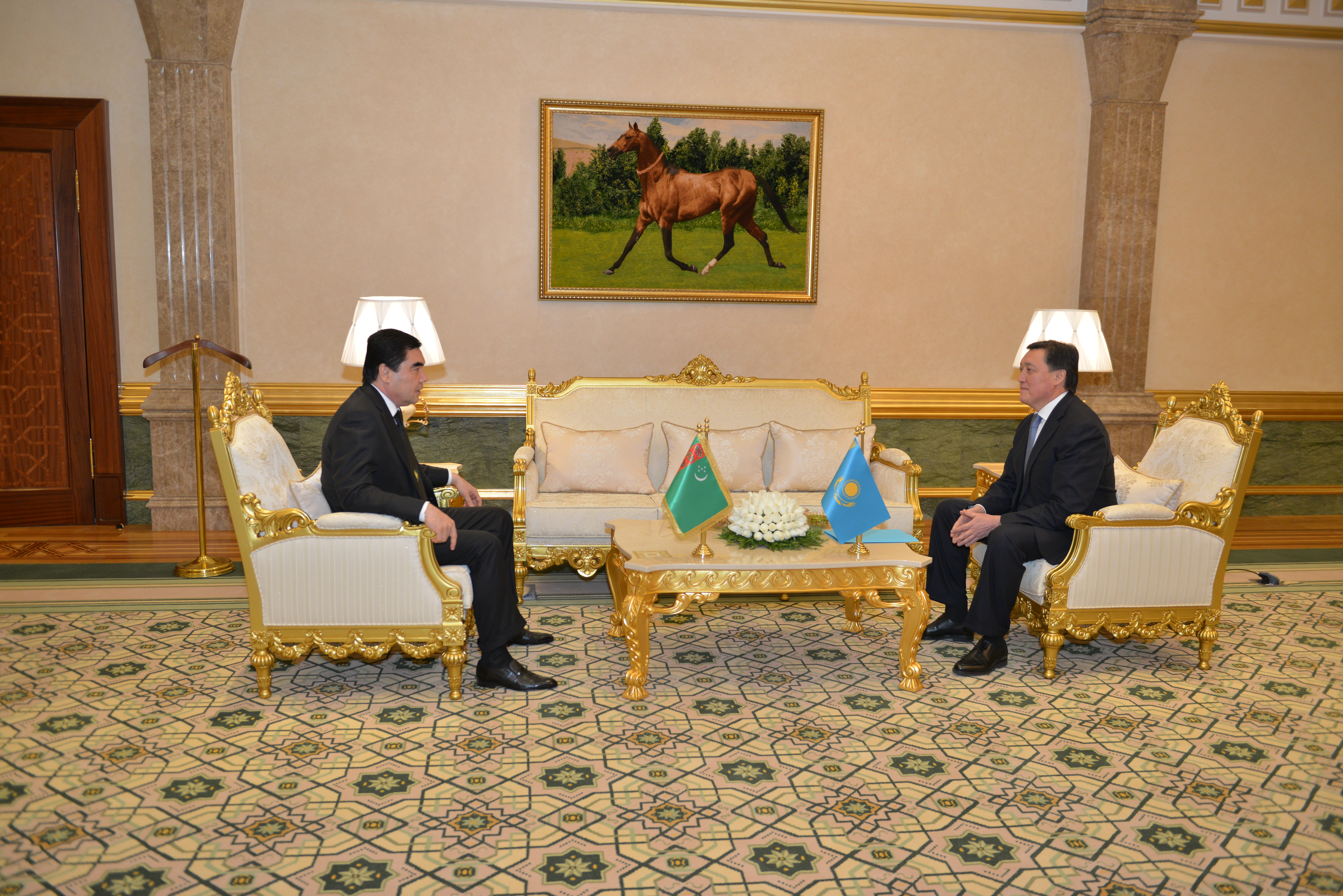 Аскар Мамин с президентом Туркменистана Гурбангулы Бердымухаммедовым